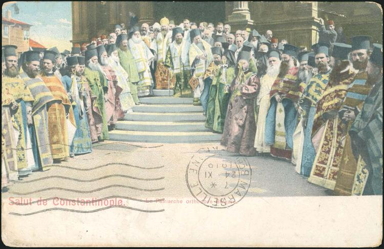 Освещаване на църквата "Свети Стефан" в Истанбул.